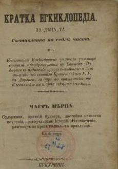 Кратка Енциклопедия от Емануил Васкидович